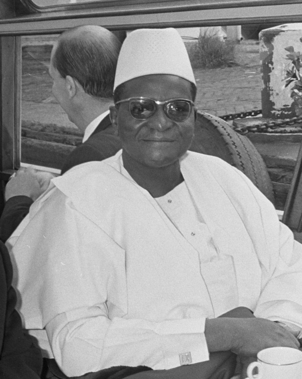 Bezoek President van Niger, rechts Z.E. Diori Hamani naast hem Minister van Transport Z.E. Faustin Zeza